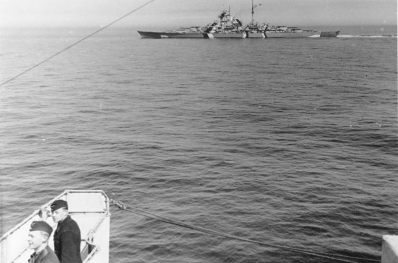 Gefechtsbildfahren in der Ostsee mit der "Bismarck" (im Hintergrund) Vorne Brückennock Prinz Eugen